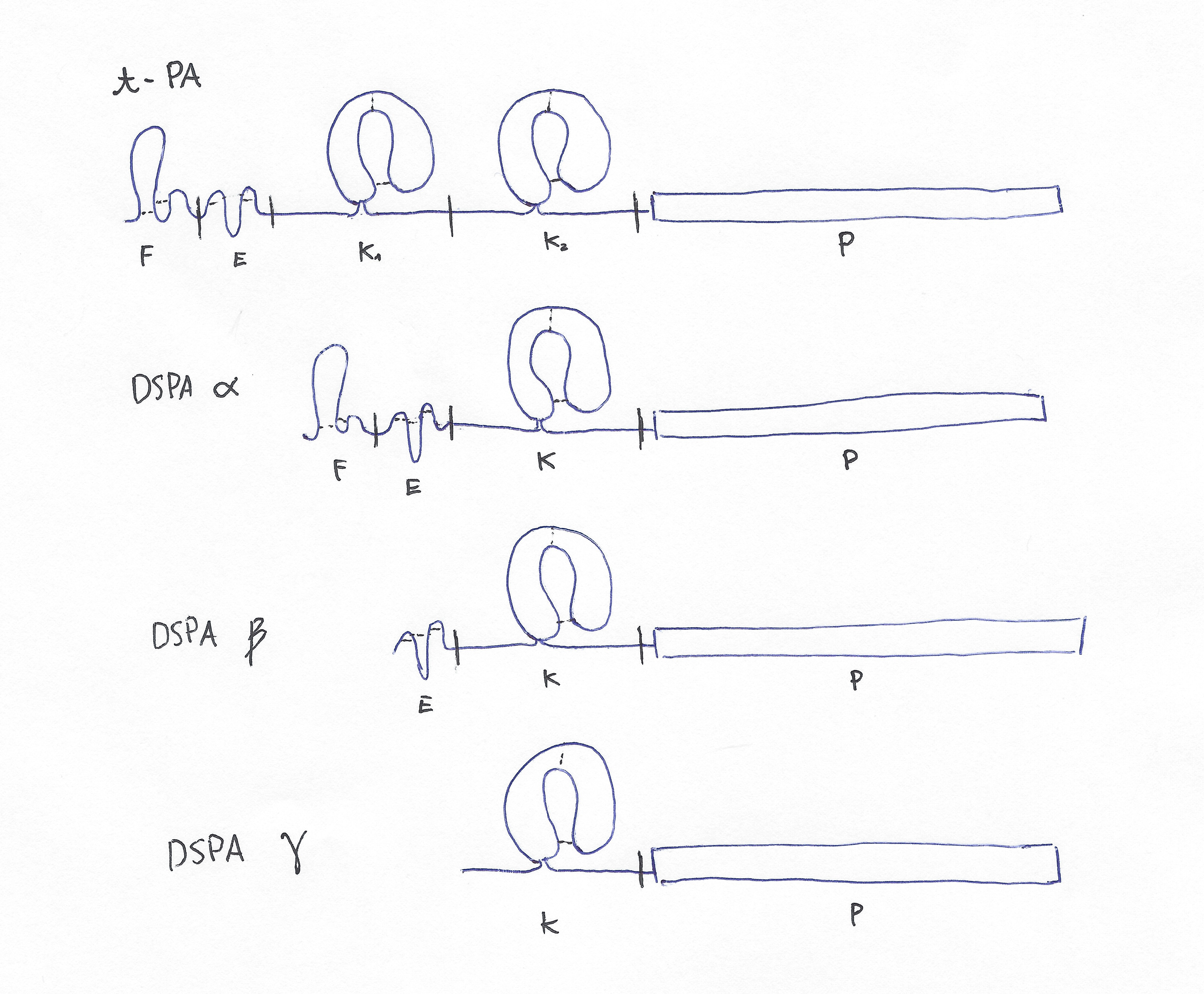 Esquema dels diferents dominis de les variants de desmoteplasa i del t-PA